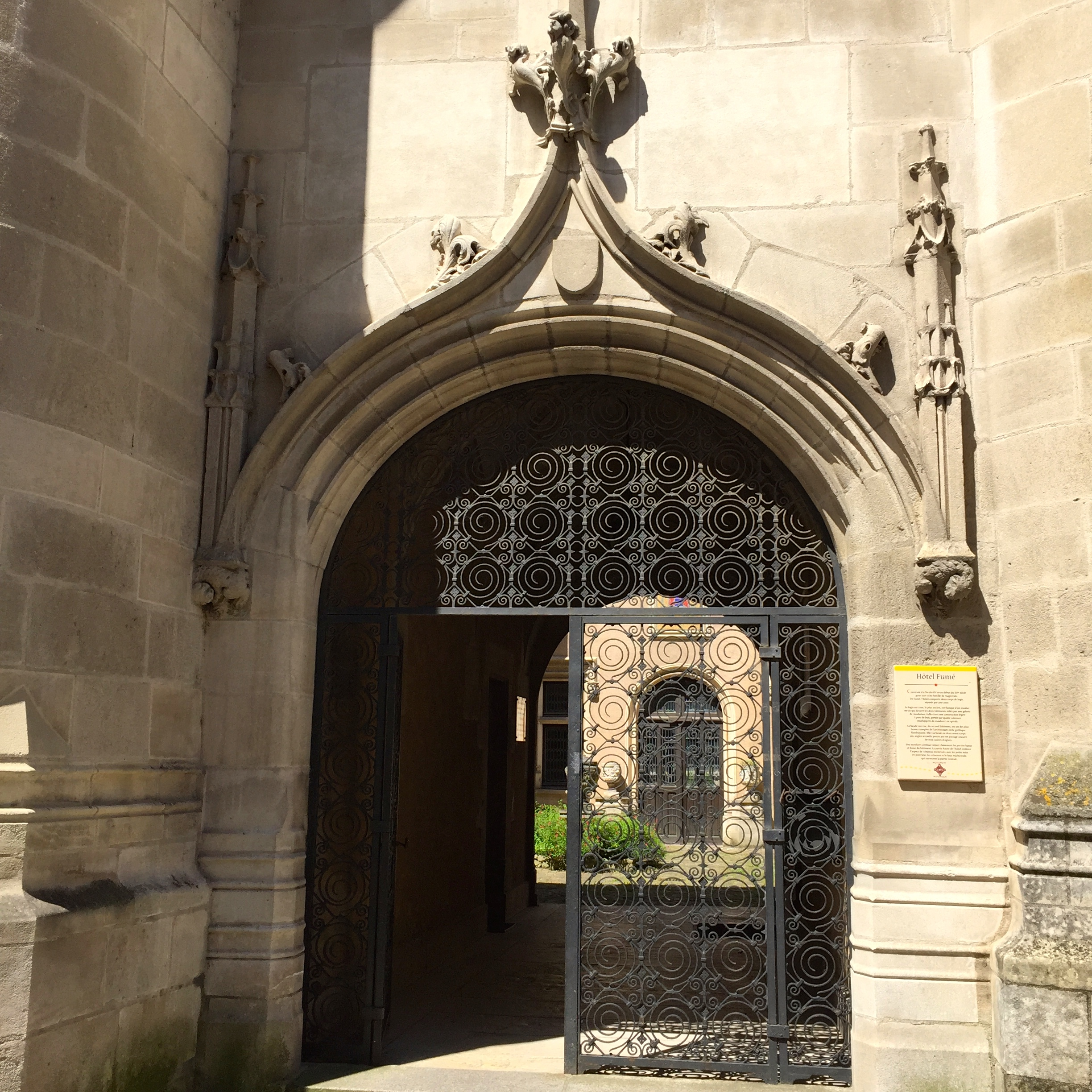 Portail de l'hôtel Fumé à Poitiers (Vienne, France)